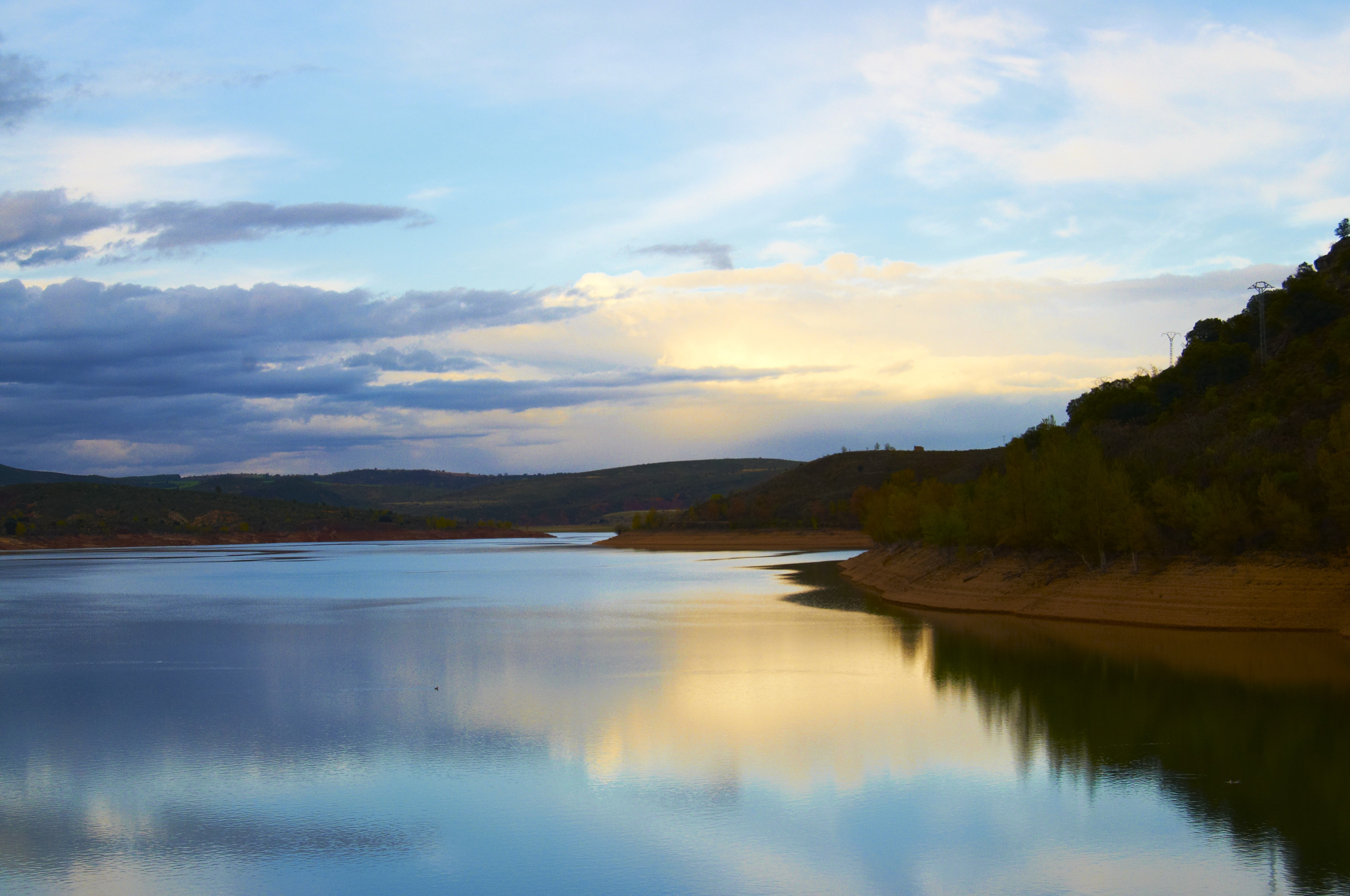 Atardecer